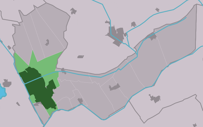 Kaartsje fan himrik fan It Hearrenfean